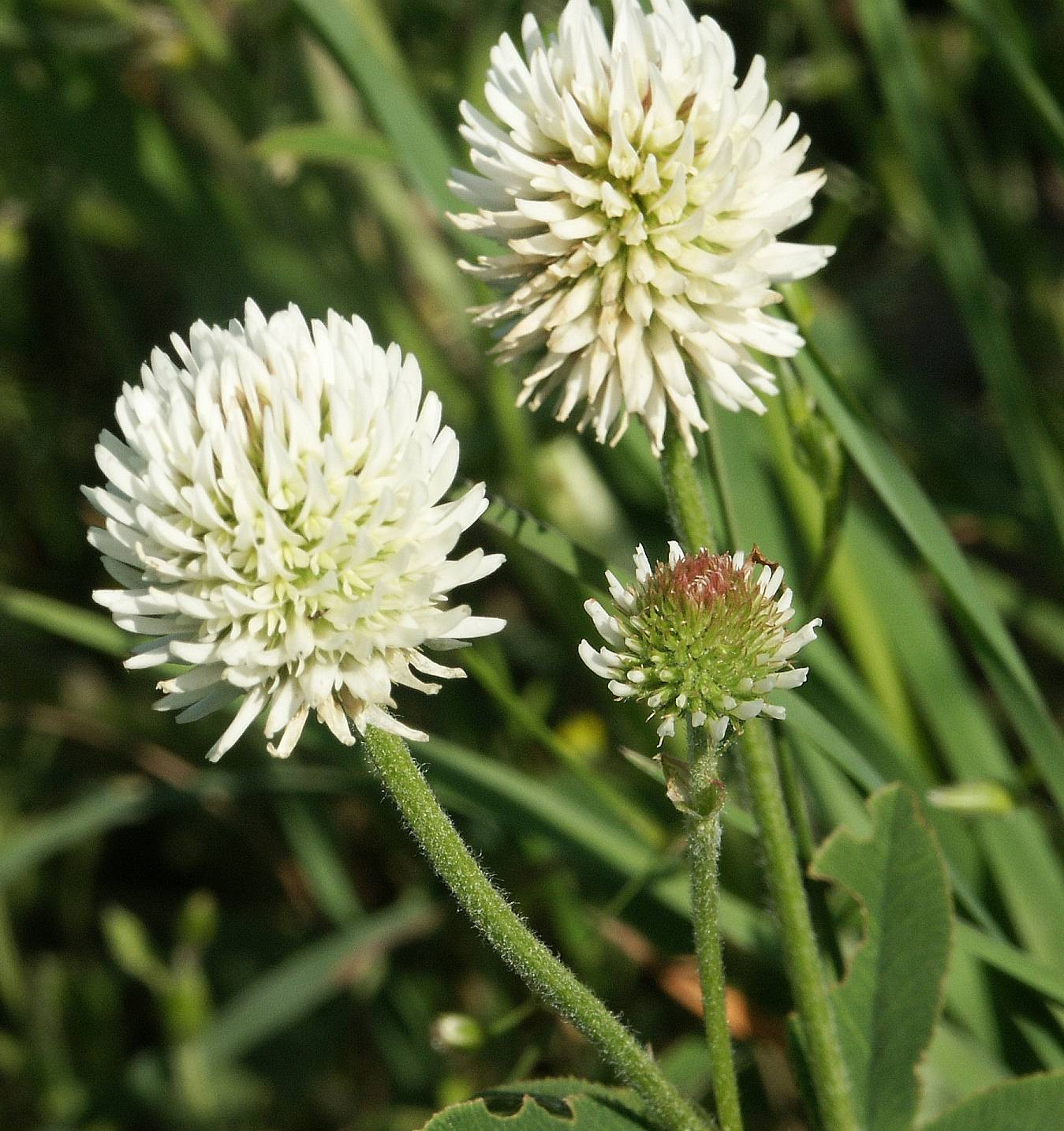 Trifolium montanum, Schwäbisch-Fränkischer Wald, Germany